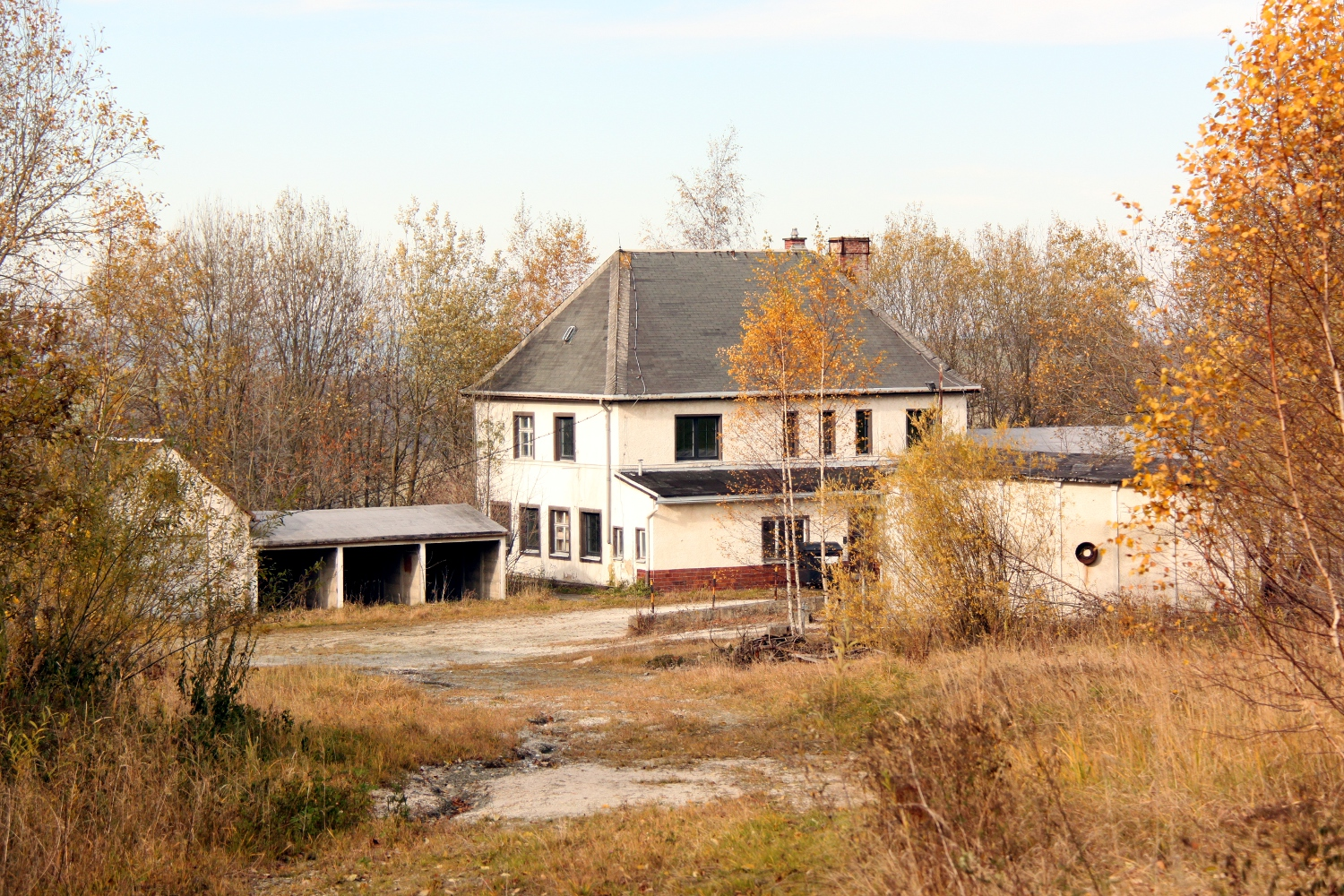 Gebäude am ehemaligen Kalkwerk Oberscheibe (Gebäude wurde 2012 abgerissen)